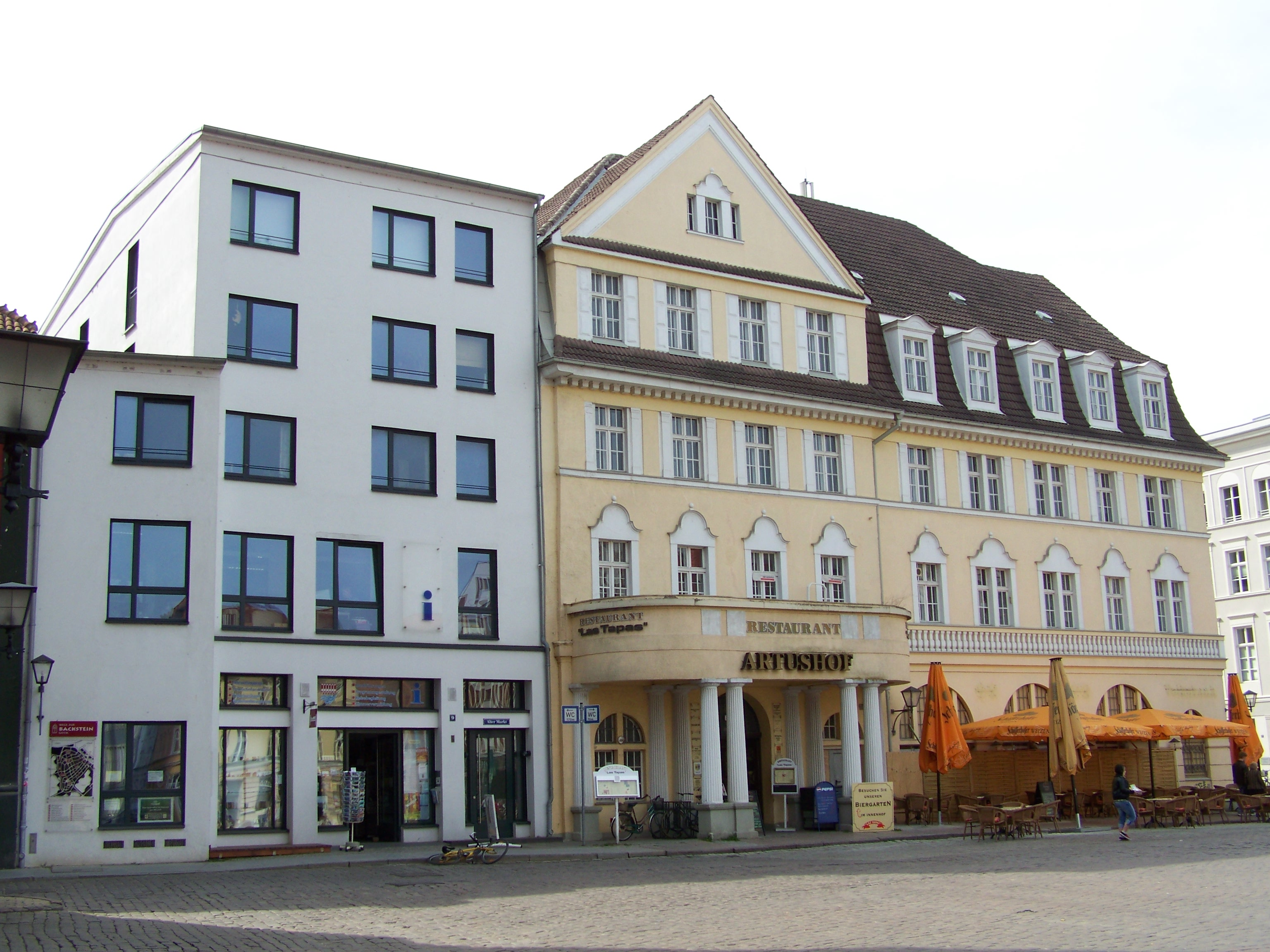 Alter Markt (Stralsund), Westseite, 2009-04-xx